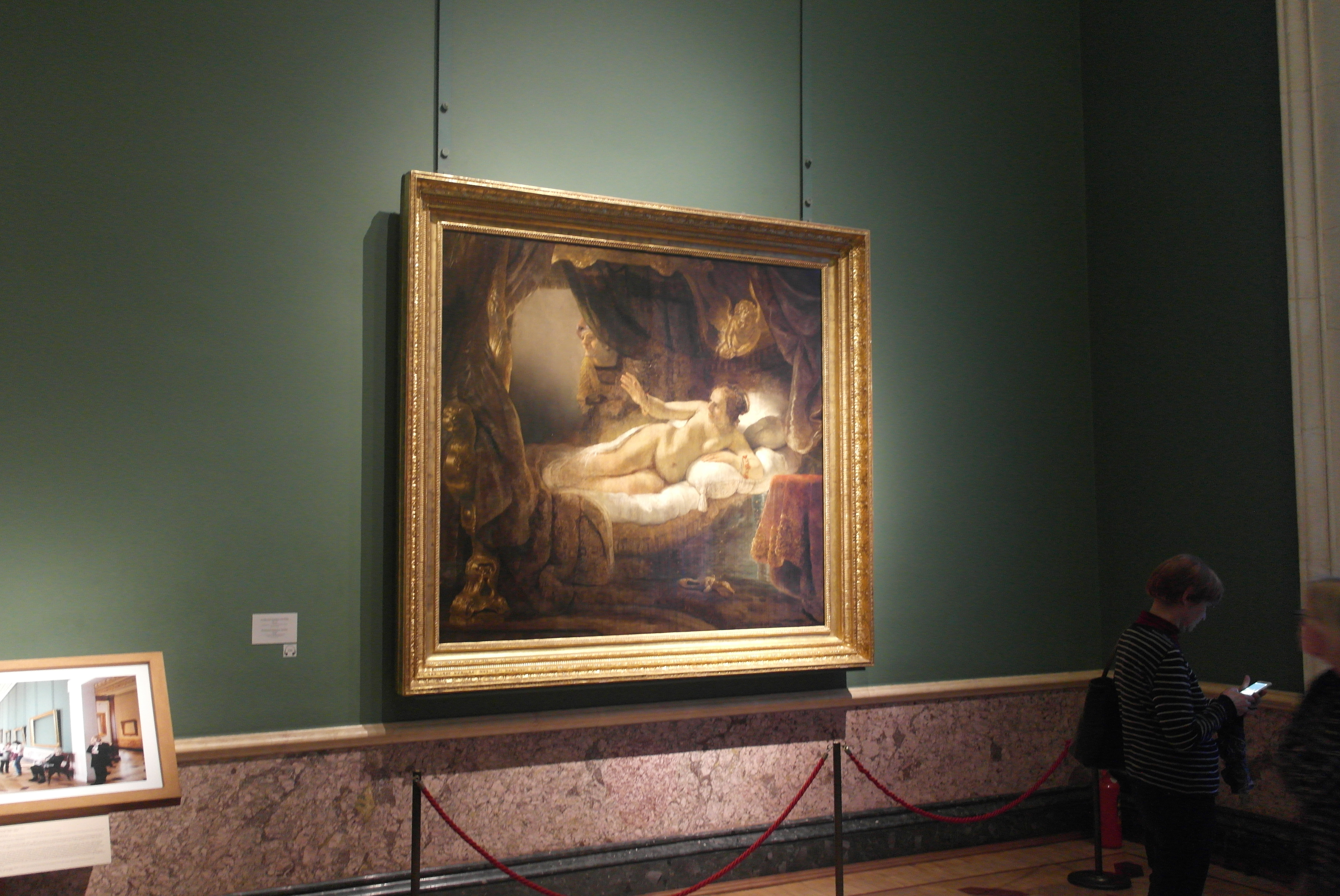 Новый Эрмитаж, зал 254 - Картина Рембрандта "Даная"